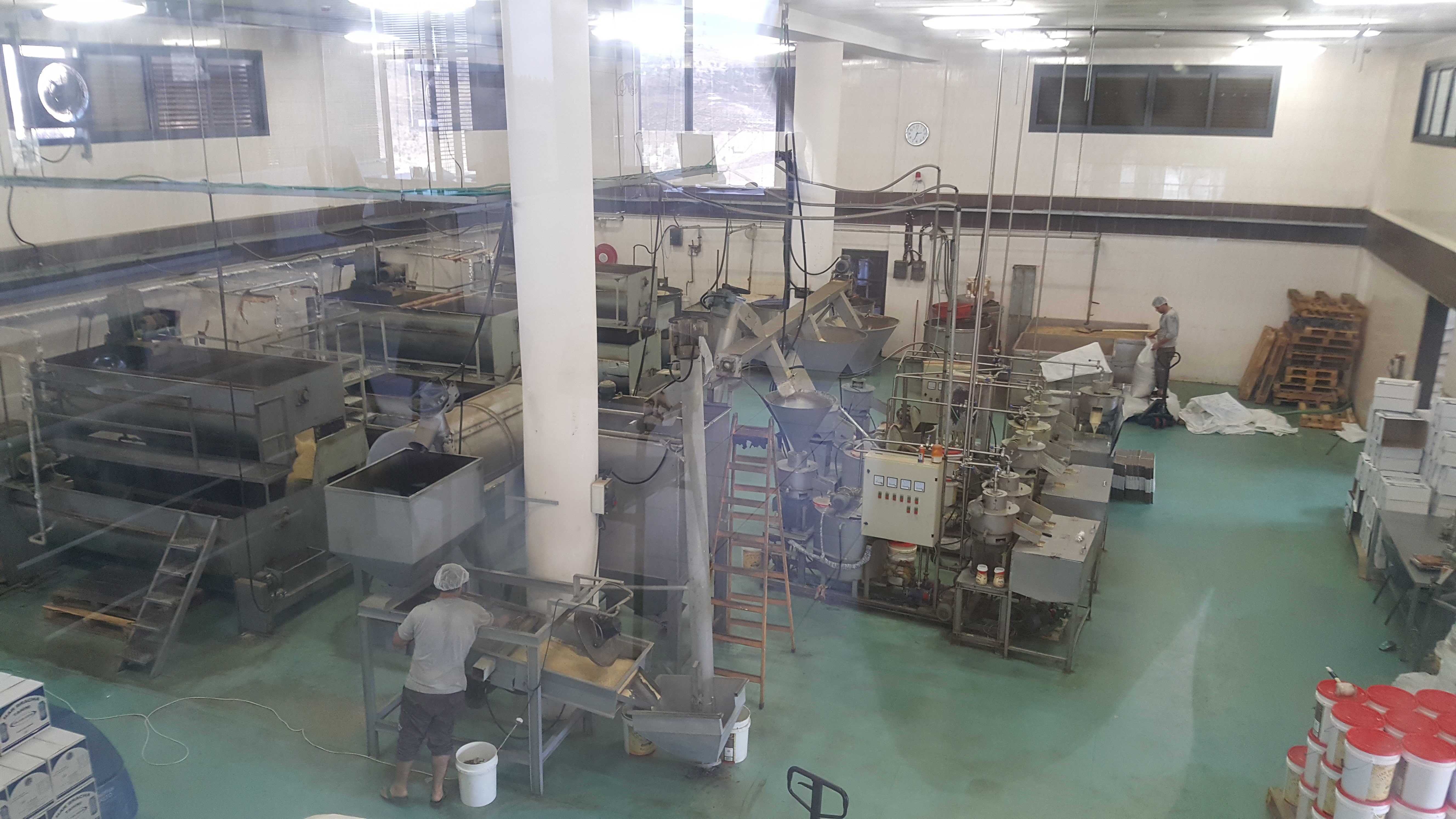 מפעל טחינה - השומרונים בהר גריזים